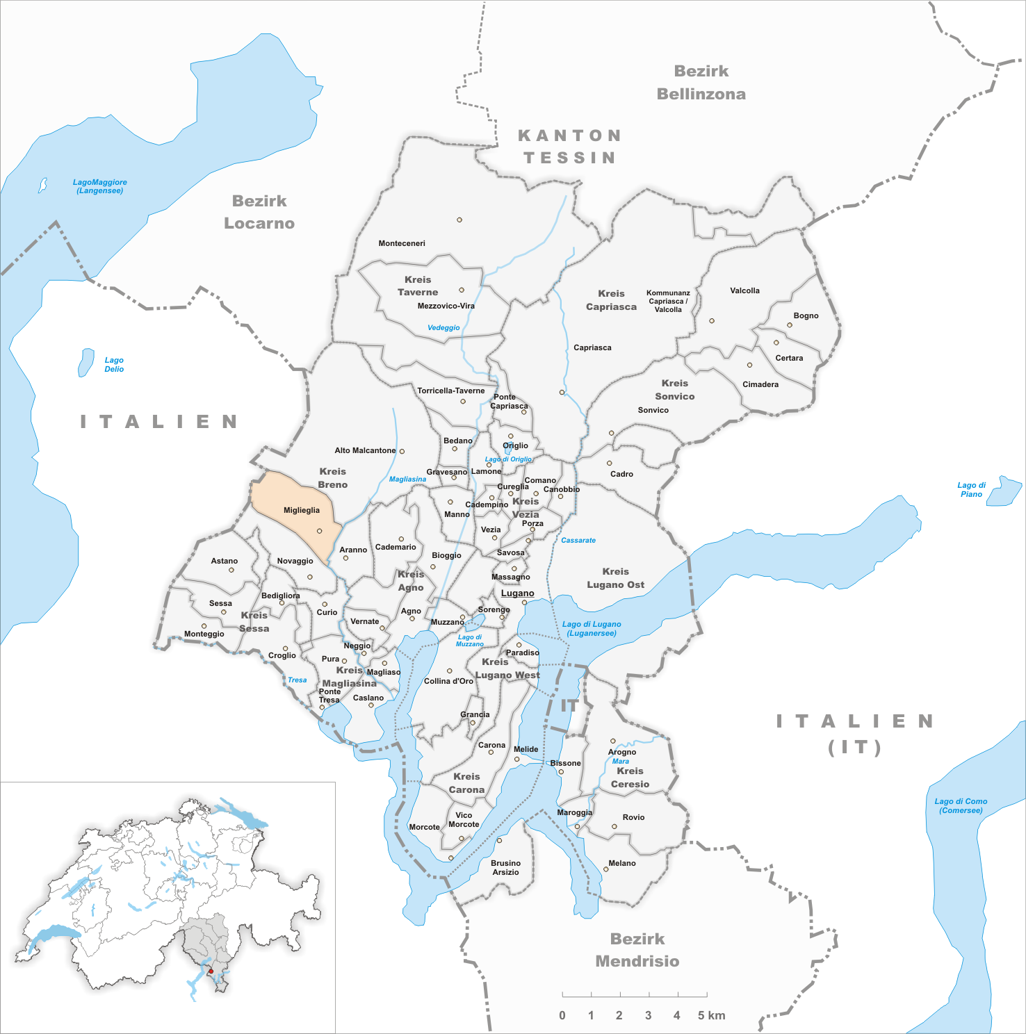 Municipality Miglieglia